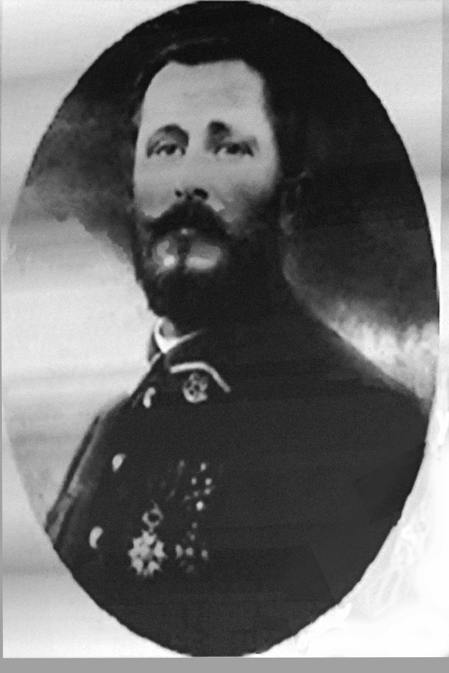 Capitaine alexandre Berthier prince de Wagram.